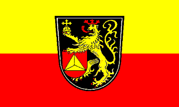 Flagge